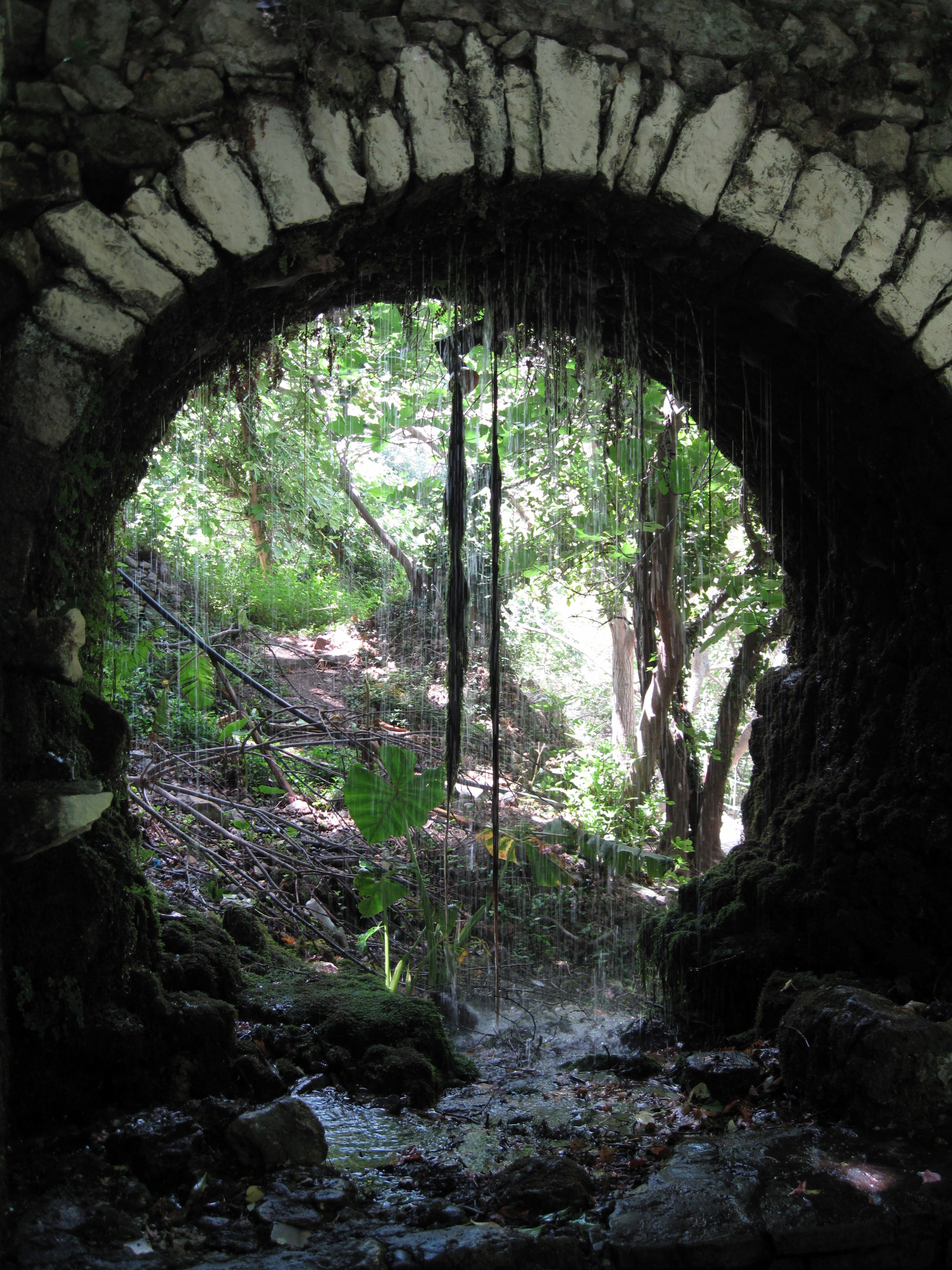 Brücke unterhalb von Argyroupoli, Gemeinde Rethymno, Regionalbezirk Rethymno, Kreta, Griechenland